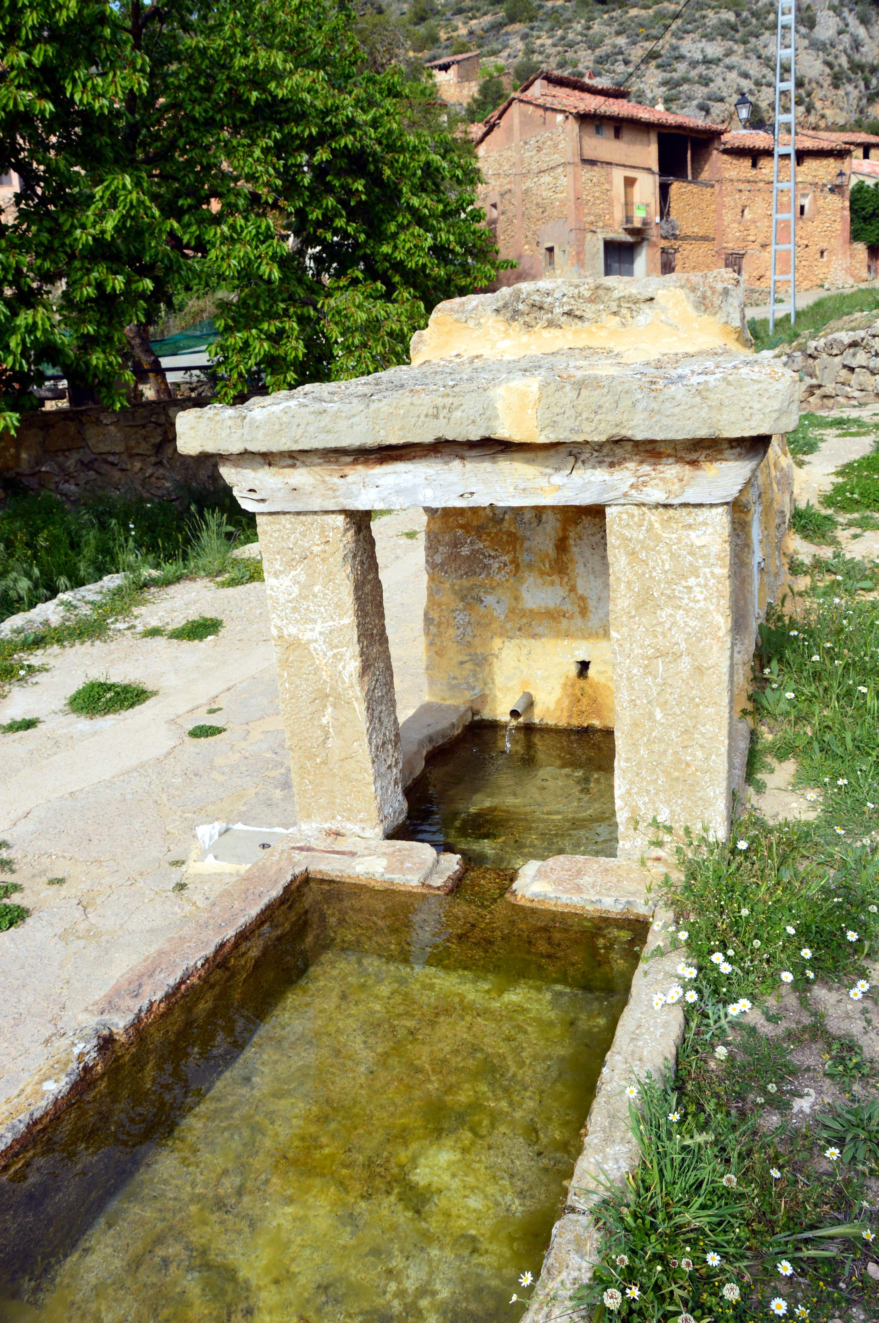 Detalle del pilón cubierto y primer abrevadero de la fuente de Sesga (Ademuz, Valencia), 2018.